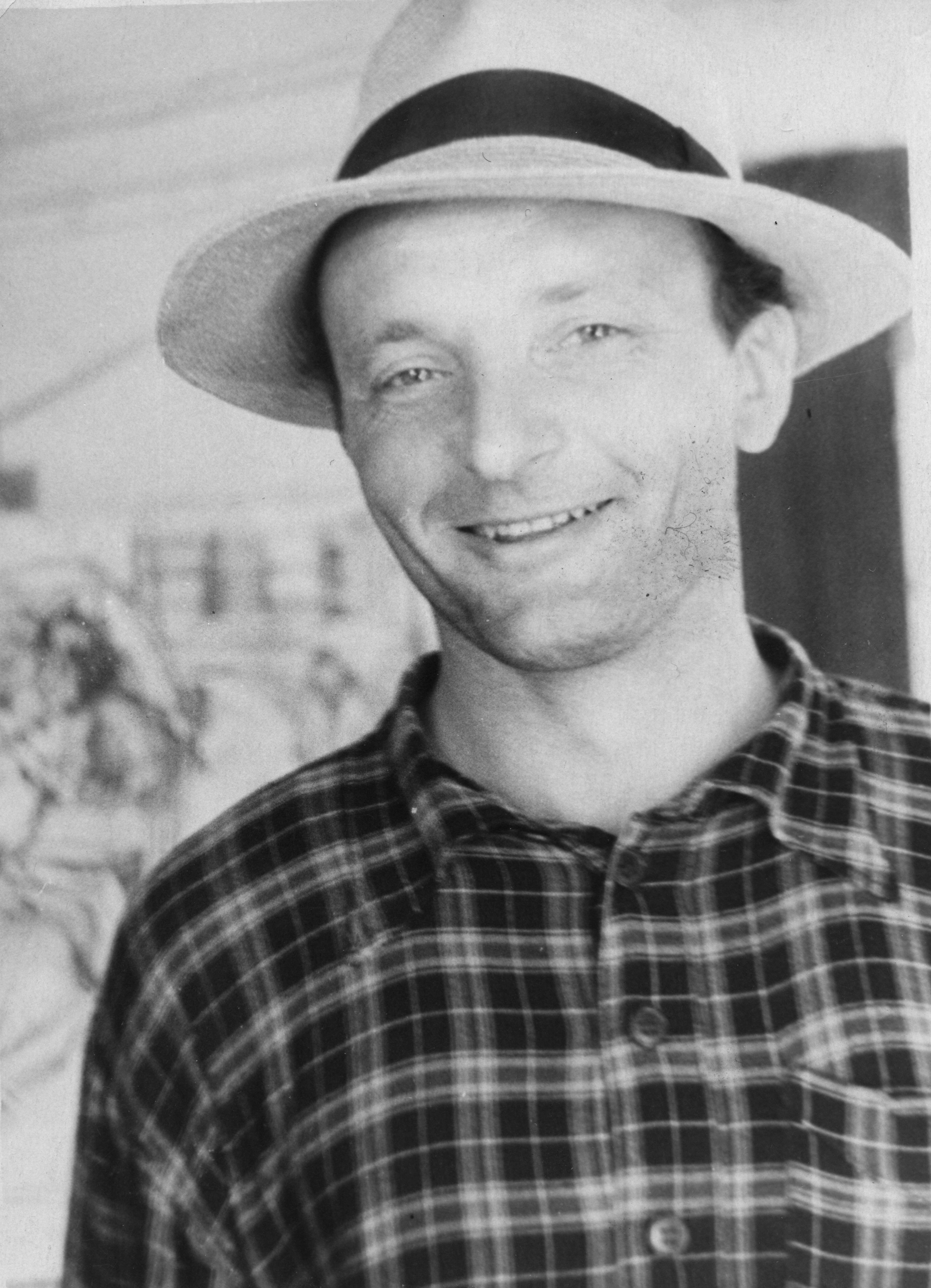 Борис Александрович Ефлов. Фотография